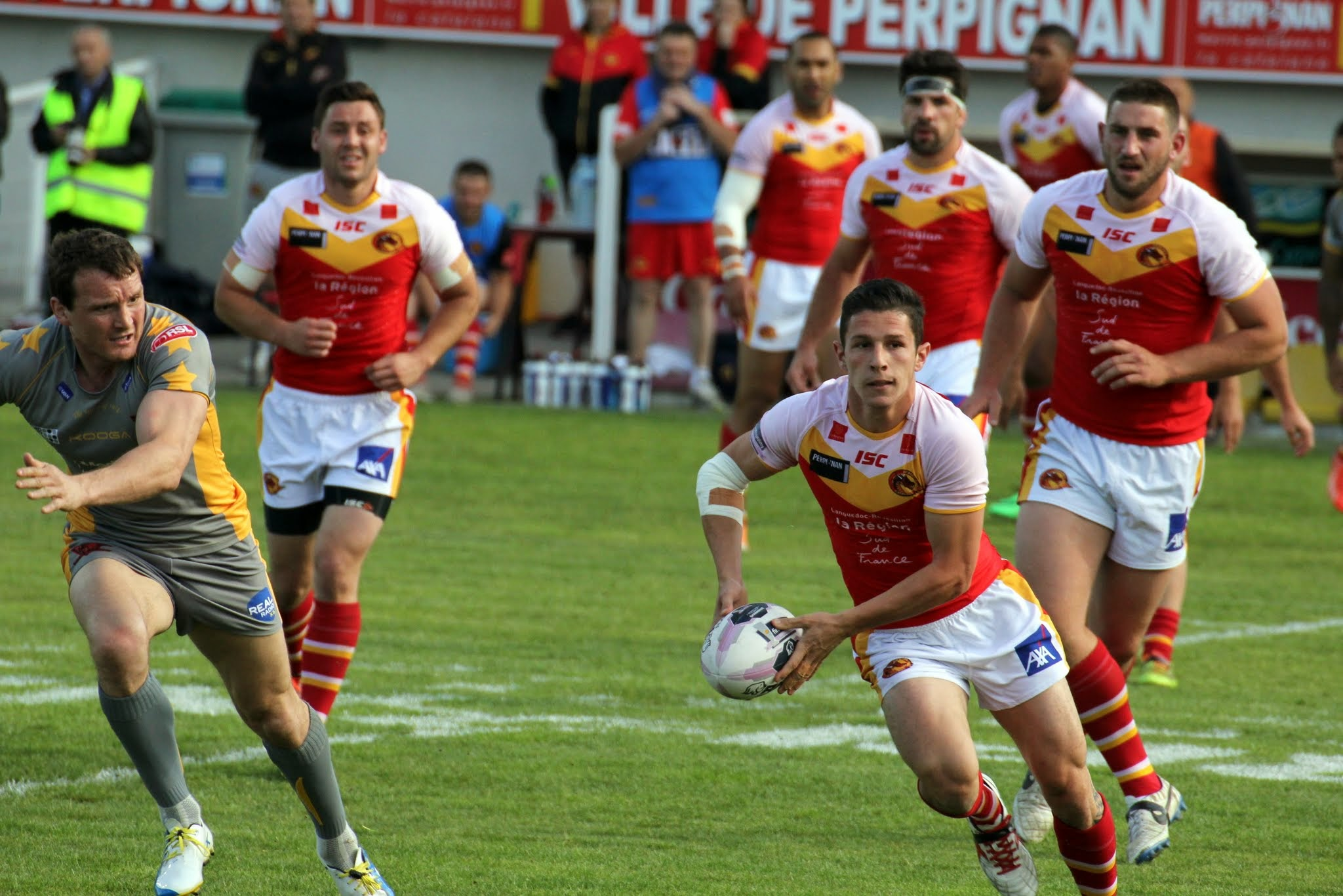 Morgan Escaré, joueur de rugby à XIII français, en avril 2014 avec les Dragons Catalans contre la Salford.